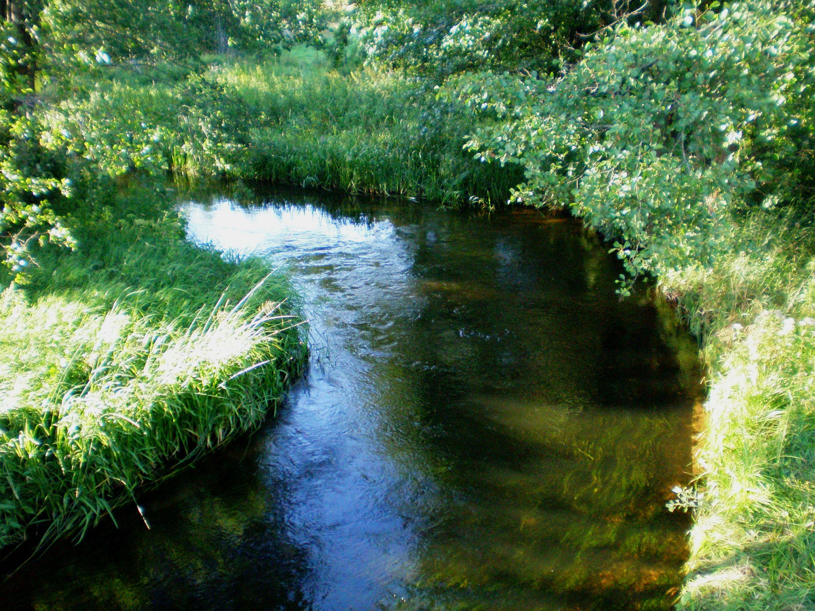 Kiauna prie Kūrinių, Švenčionių raj., Lietuva